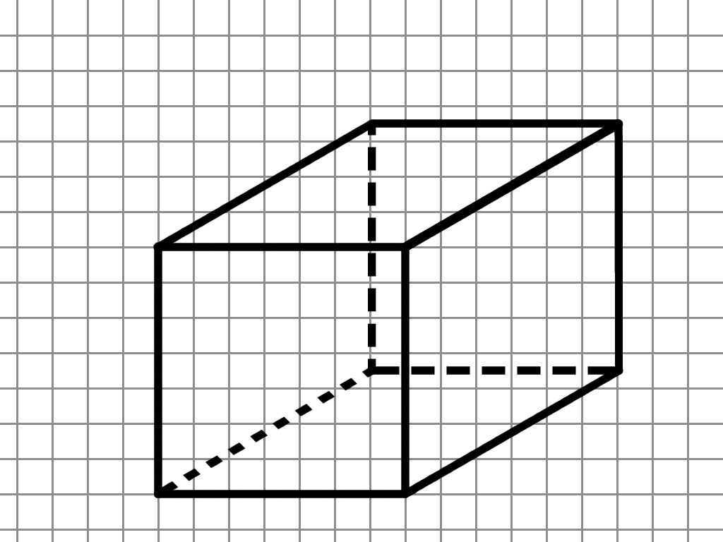 الخطوة الثالثة: الوصل بين الخطوط لرسم كل الأوجه الخلفية